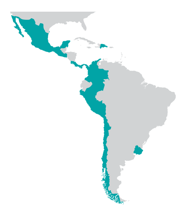 Presencia de Grupo Sura en latinoamérica.